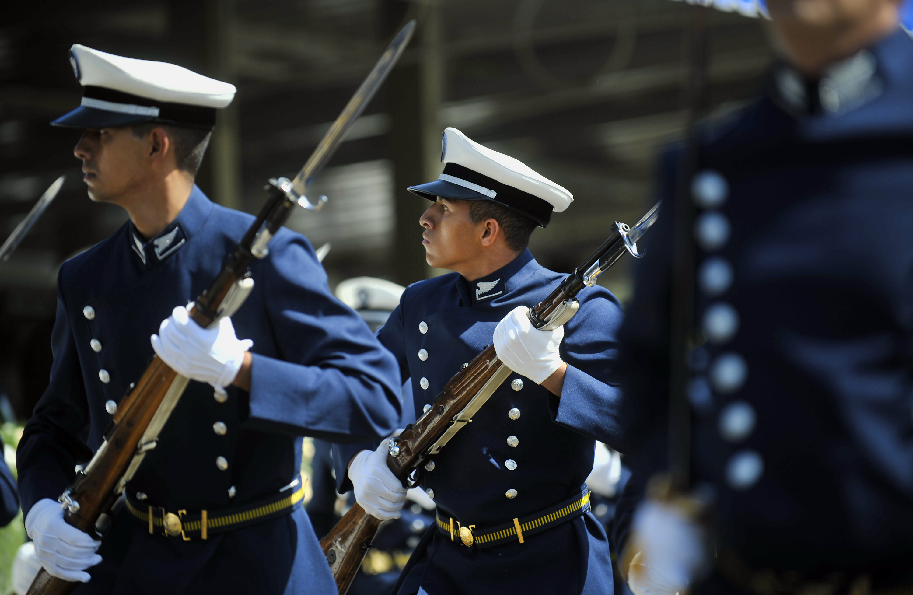 14/08/2013, Brasília-DF Fotos: Tereza Sobreira